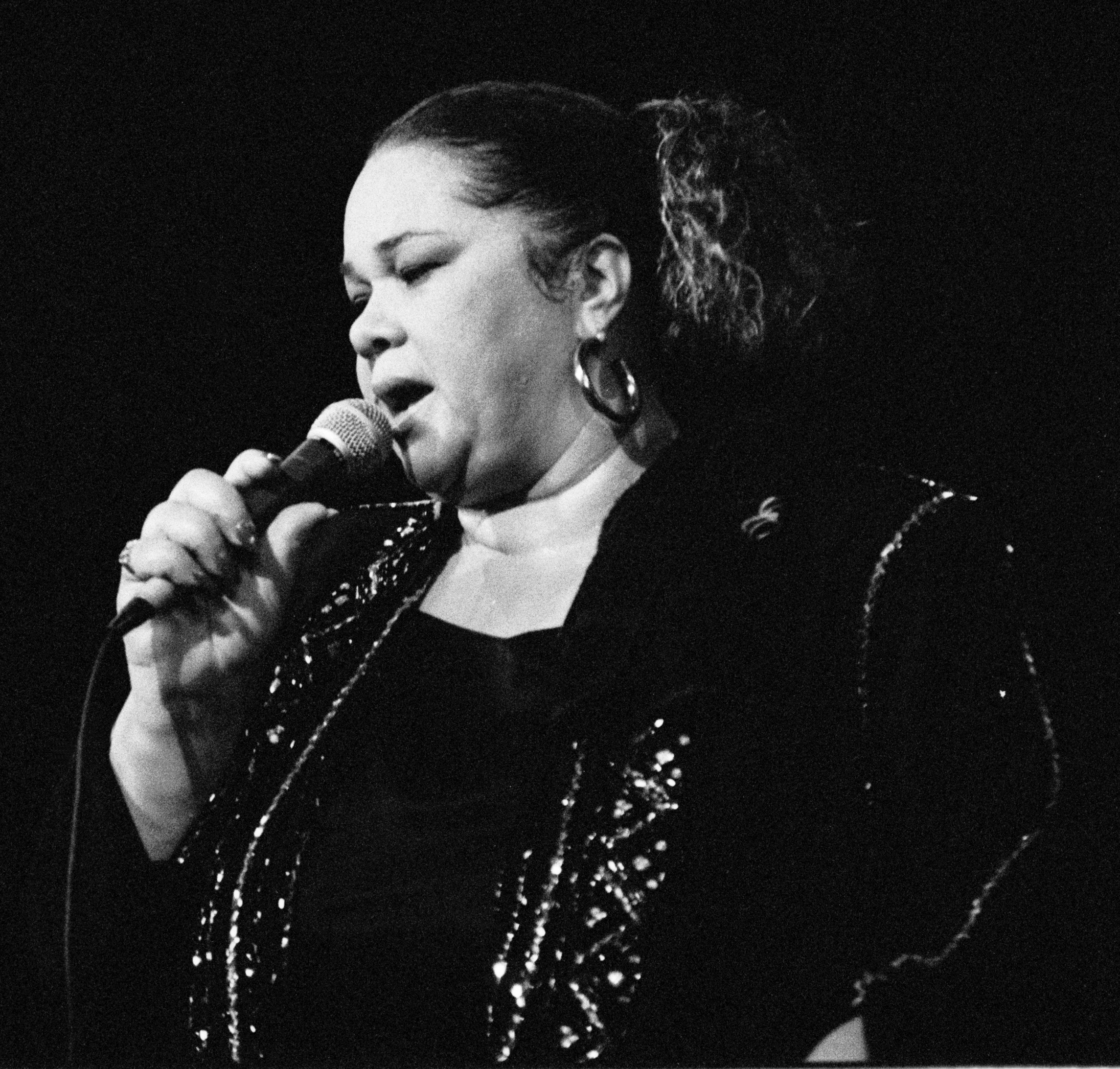 La chanteuse américaine de blues Etta James en concert à Deauville (Normandie, France) en juillet 1990.